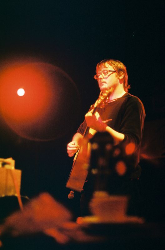 Ścianka live @ ACK Chatka Żaka, Lublin